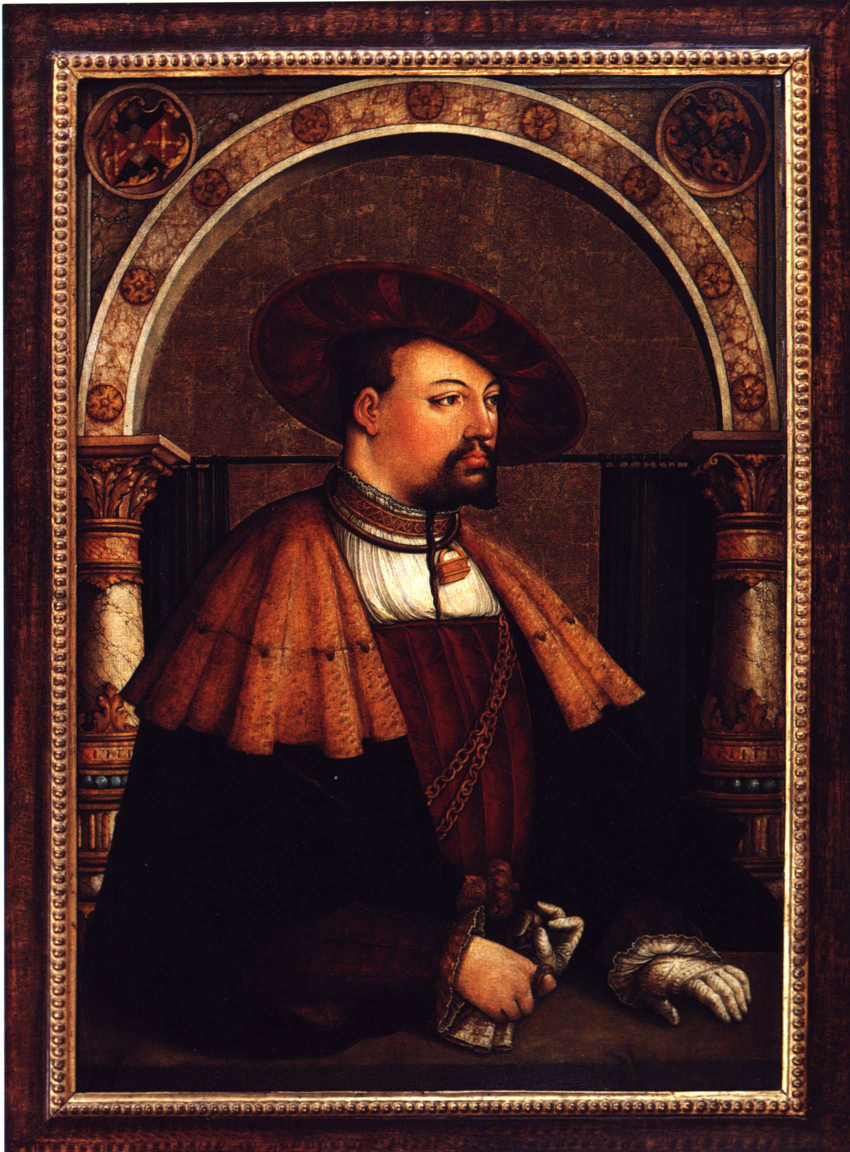 Brustbild Eitelfriedrichs III. von Zollern von 1561, nach einer Vorlage von 1520 repräsentativ neu gestaltet.